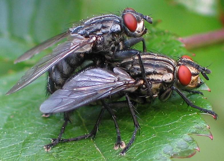 A photo of Sarcophaga carnaria. Taken by Soebe in northern Germany and released under GNU FDL. Beschreibung von der ursprünglichen Version in de.wikipedia: Kopulierende Fleischfliegen (Sarcophaga carnaria), fotografiert im Mai 2004 von soebe Titel: Kopulierende Fleischfliegen auf Stockrosenblatt Foto: soebe, 30.05.2004 Lizenz: GNU-FDL Beschreibung: Das Foto entstand in Eckernförde im Garten meiner Eltern. Die Tiere sitzen auf einem Blatt einer Stockrose und haben sich von der Nahaufnahme nicht beirren lassen. First upload in de.wikipedia on 1 Jun 2004 by Soebe